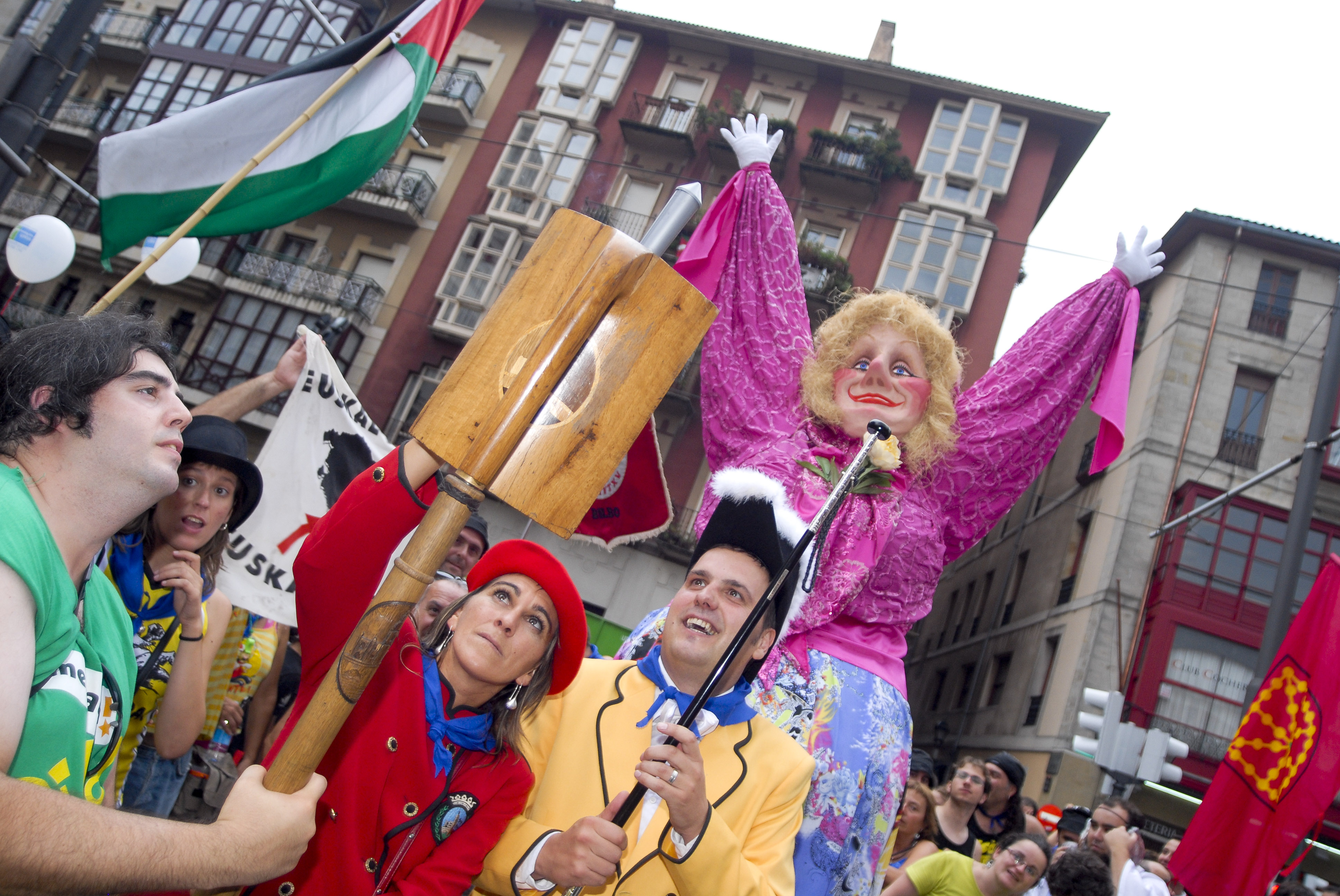 Larunbata20-79